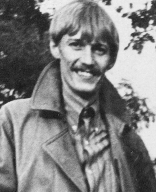 Hootenanny Singers, från vänster: Hansi Schwarz, Johan Karlberg, Björn Ulvaeus och Tony Roth.